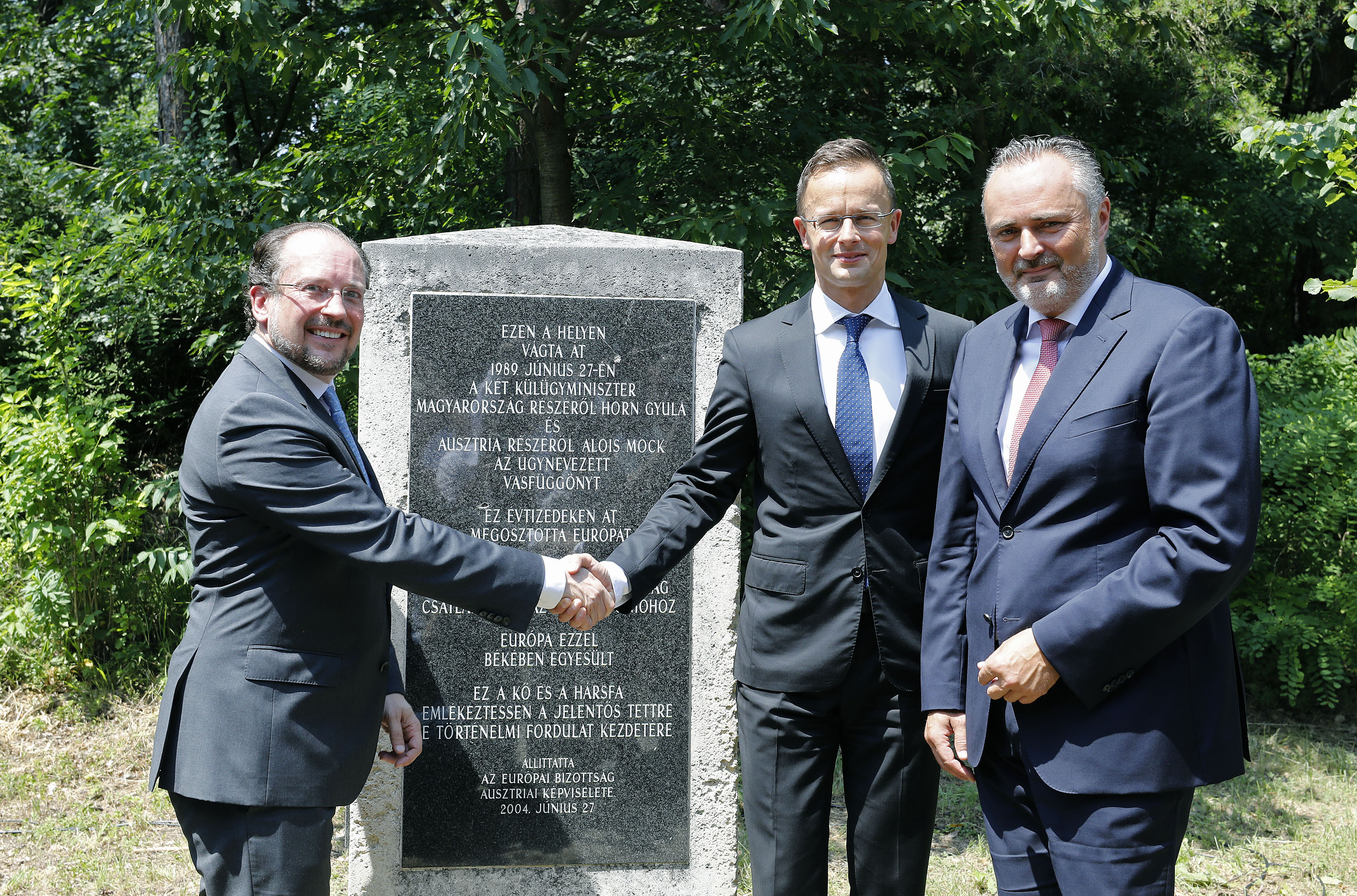 Gedenkveranstaltung 30 Jahre Fall des Eisernen Vorhangs. Mit BM Schallenberg, ungarischem AM Szijjarto und LH Doskozil. Sopron. 27.06.2019, Foto: Dragan Tatic